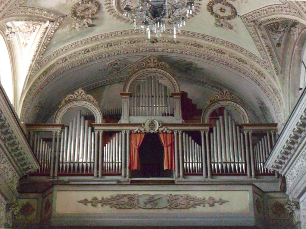 Gioiosa Jonica Chiesa dell'Addolorata Organo a canne